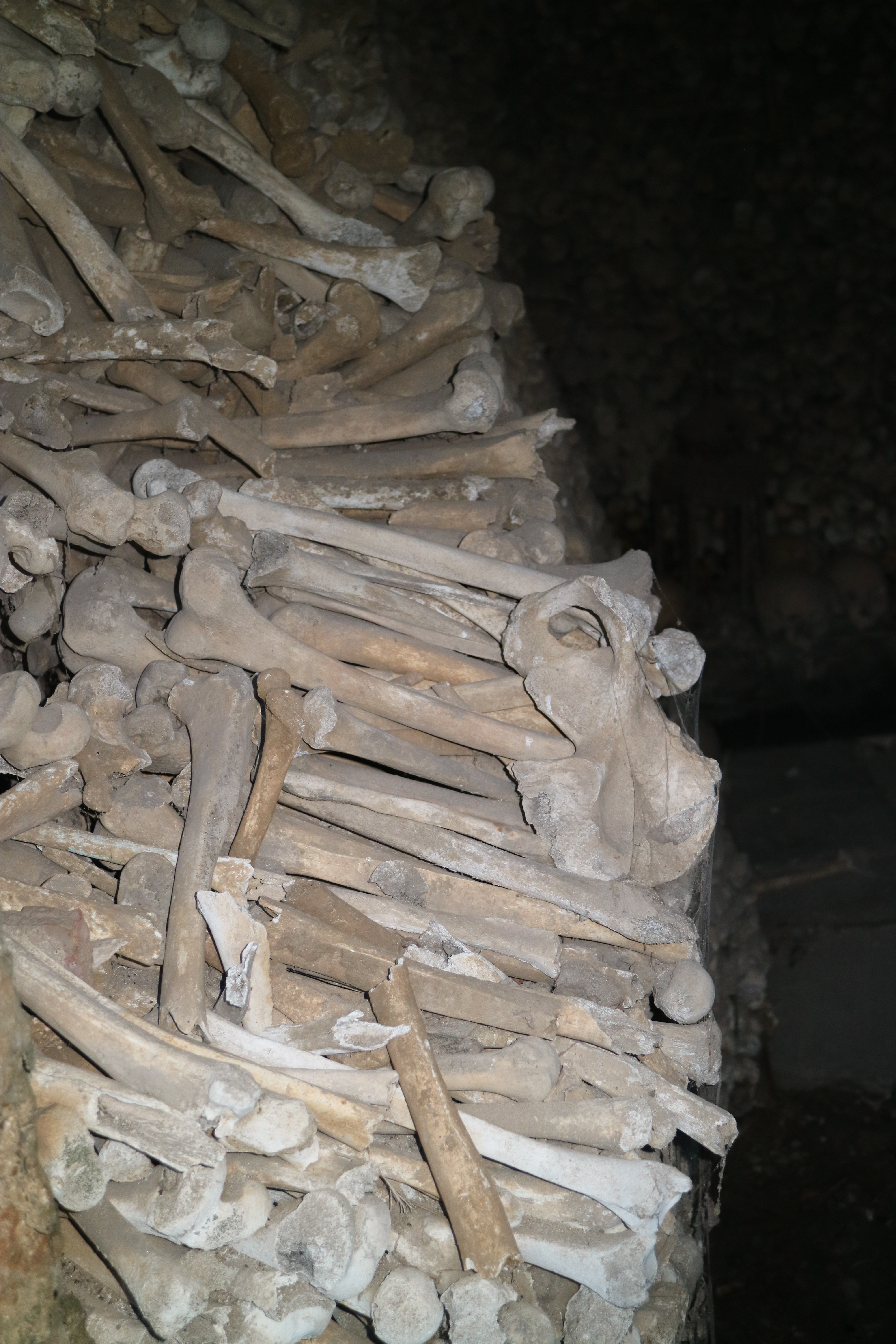 Knochenkammer unter der Pfarrkirche Deutschfeistritz, Gemeinde Deutschfeistritz (Steiermark)